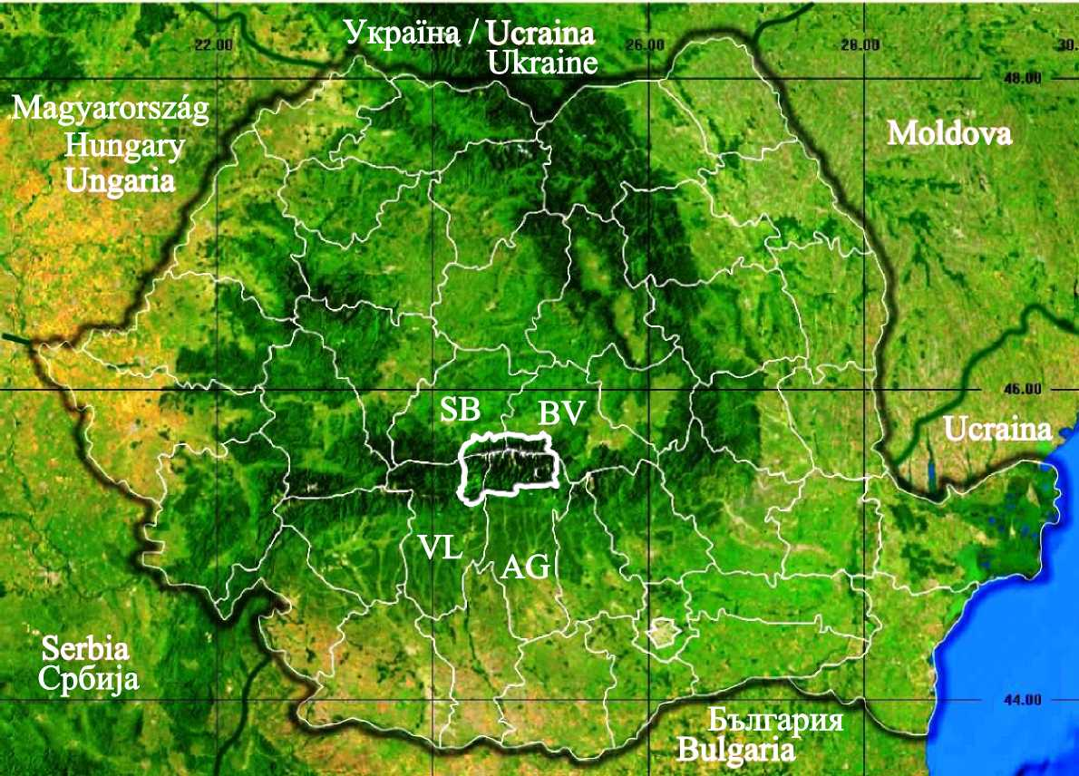 Harta localizare muntii Fagarasului, Romania.